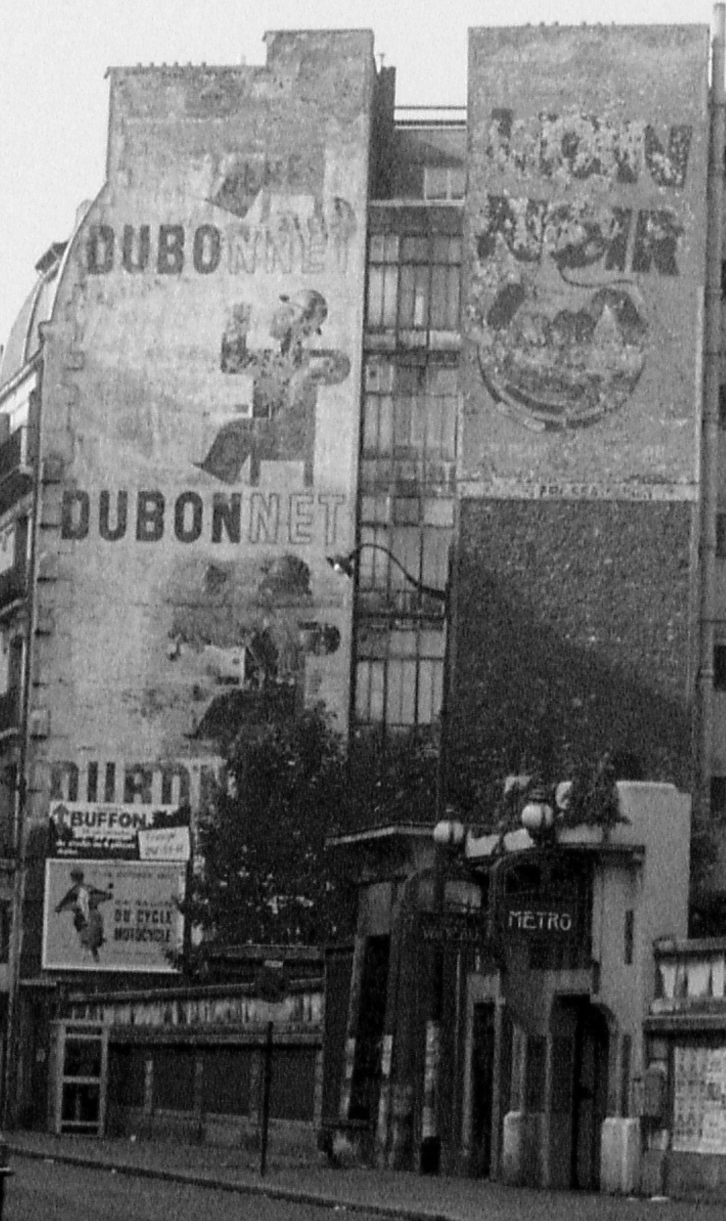 Paris. Vaneau. Foto 1977